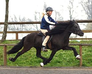 Islandpferd im Rennpass